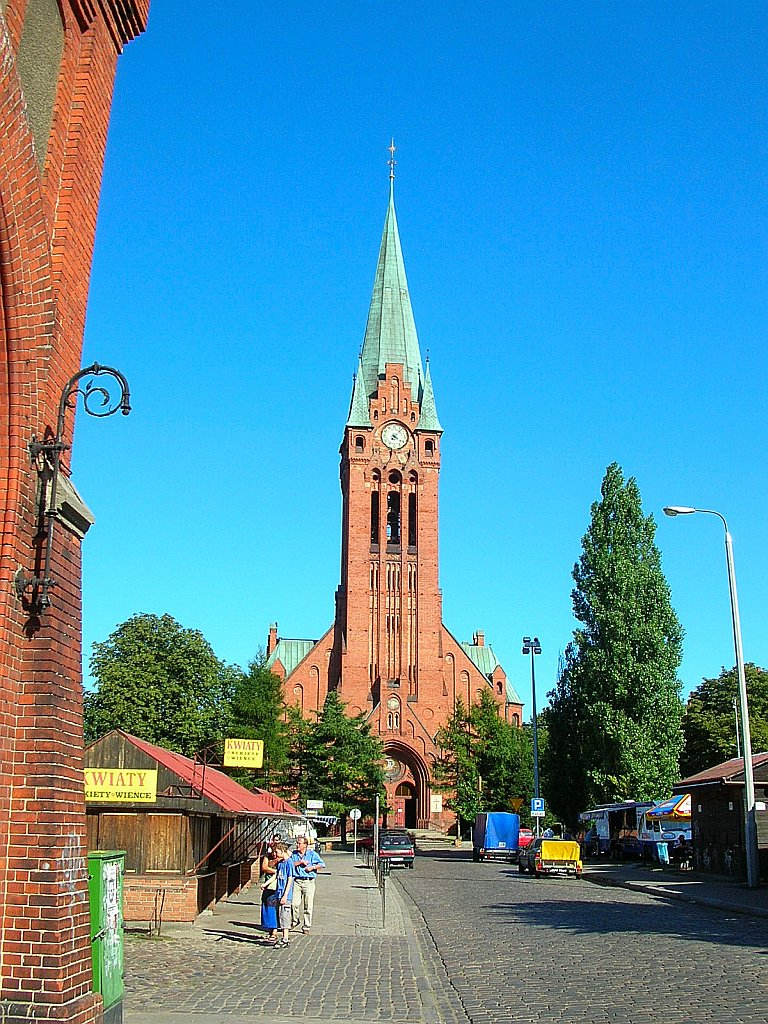 Kościół jezuitów św. Andrzeja Boboli w Bydgoszczy